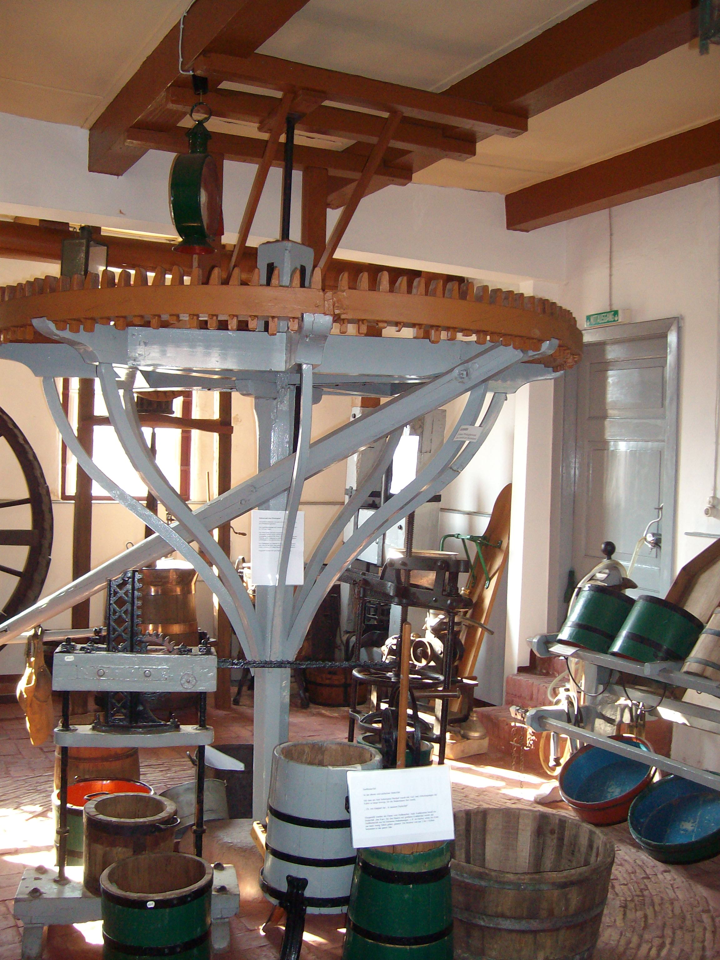 Geräte zur Butterherstellung, Heimatmuseum Rheiderland, Weener, Niedersachsen, Deutschland